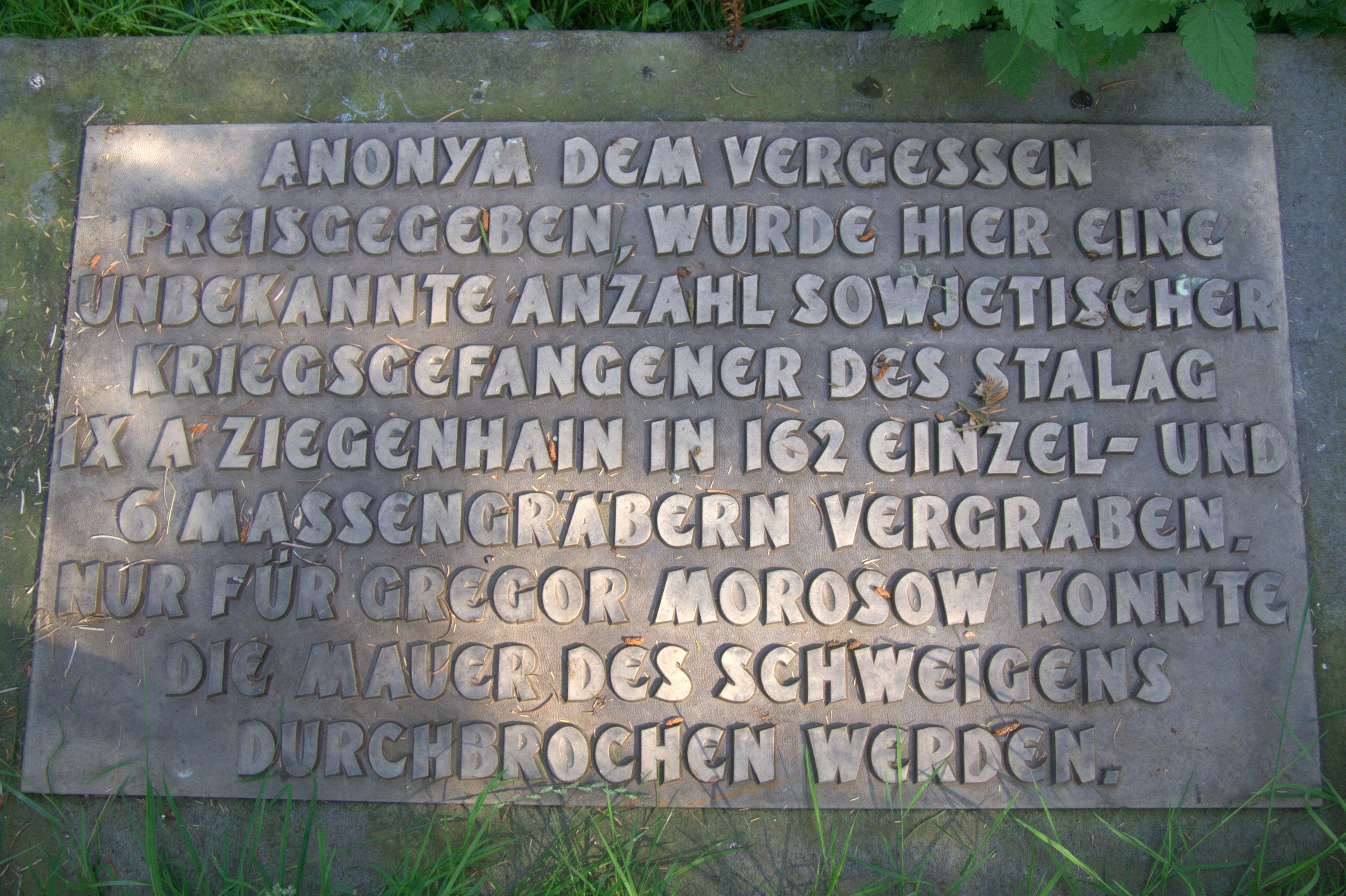 Gedenktafeln für die Ehrung der verstorbenen des Kriegsgefangenenlagers Stalag IX A Ziegenhain